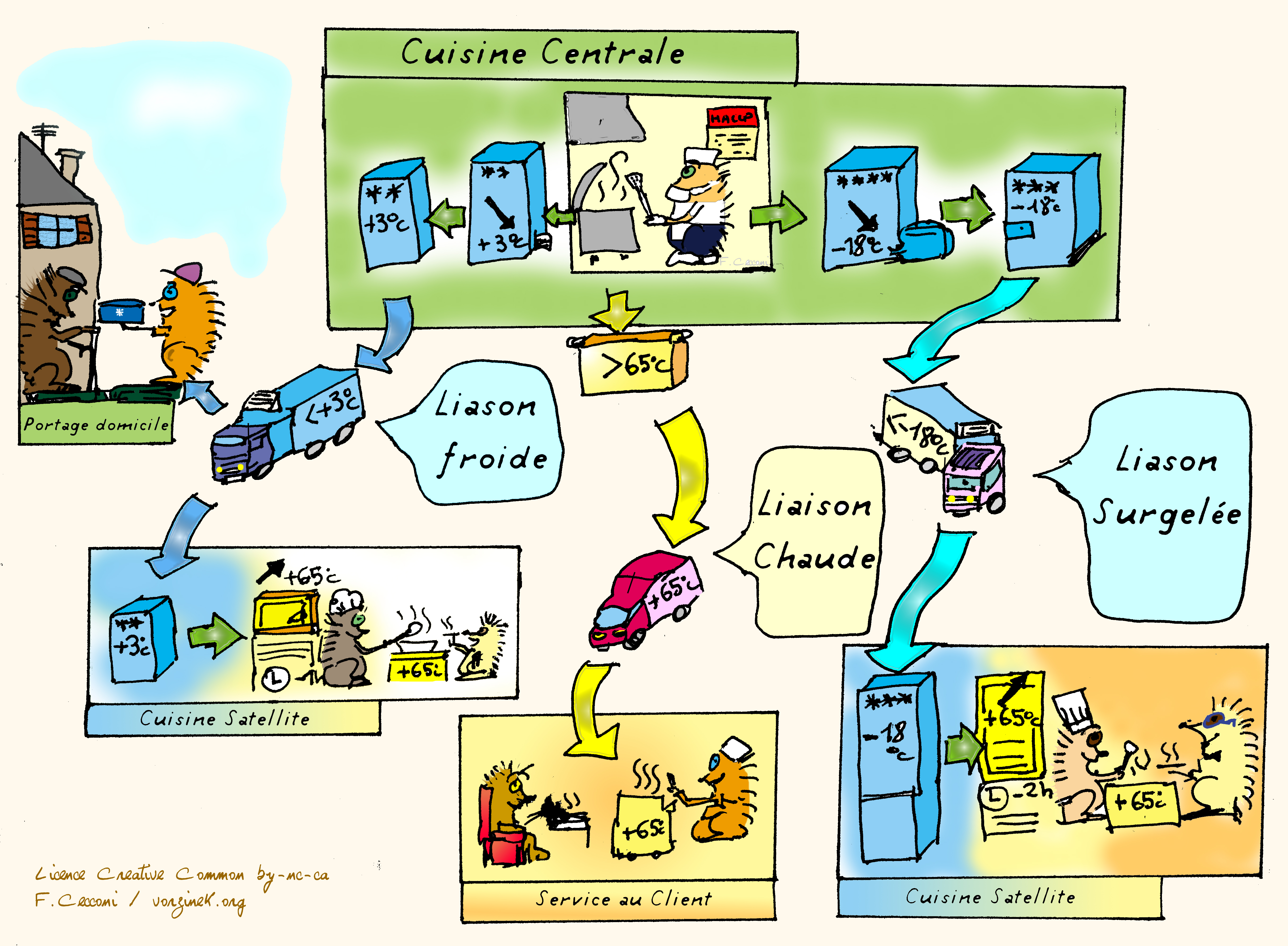 Schéma de la liaison froide chaude et surgelée (transport des Plats cuisinés à l'avance PCEA(. Cuisine centrale et cuisines satellites document pedagogique pour les cours de technologie de cuisine, de sciences appliquées à l'hygiène et à l'alimentation.Version couleur